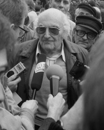 ADN-ZB/Weisflog/4.11.89/ Berlin: Demonstration/ 500.000 Bürger beteiligten sich an einer Demonstration mit anschließendem Meeting auf dem Alexanderplatz für den Inhalt der Artikel 27 und 28 der Verfassung der DDR. Der Schriftsteller Stefan Heym, einer der Redner während des Meetings, antwortete auf Fragen von Journalisten.